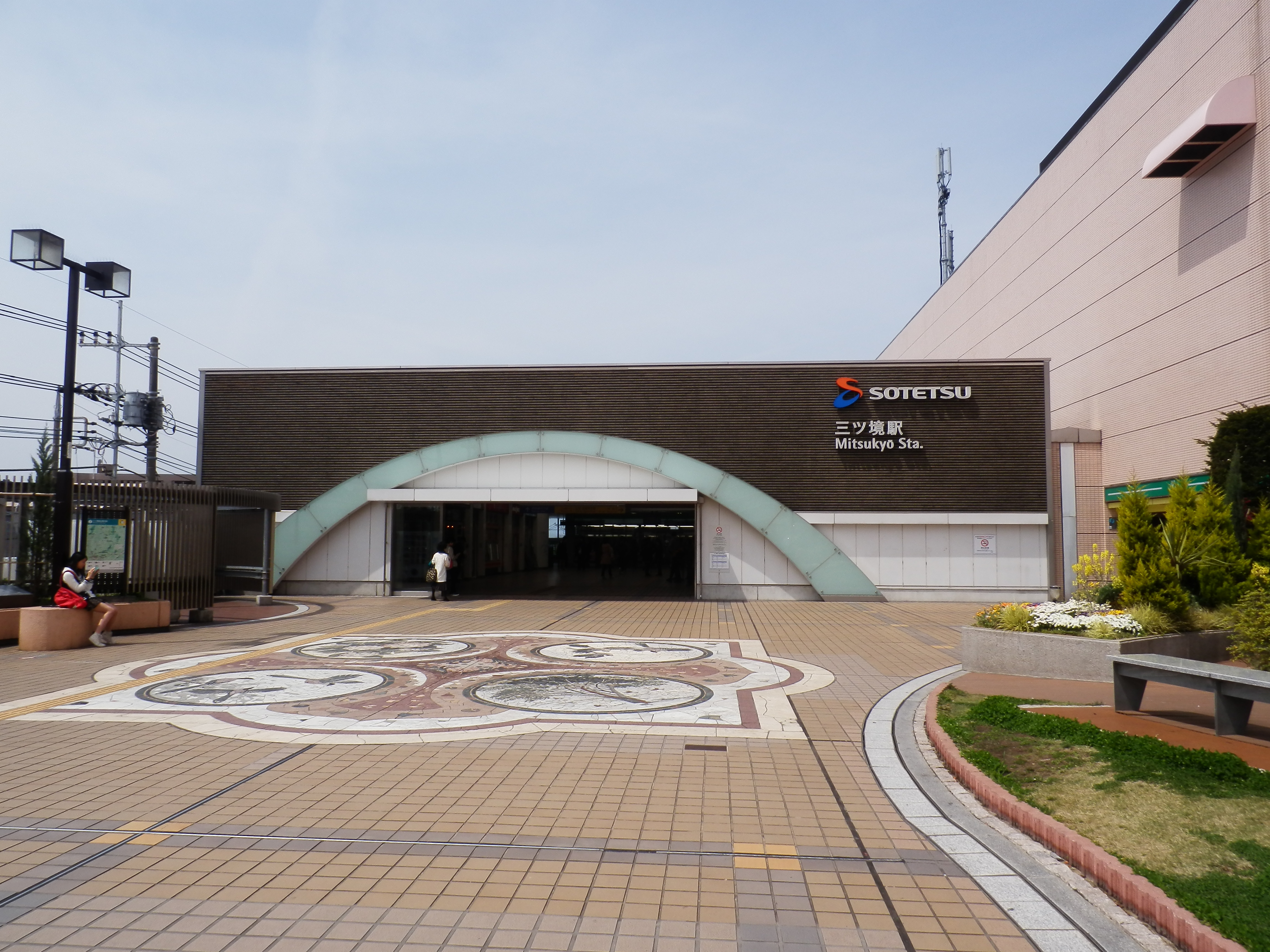 相鉄線三ツ境駅の駅入口はペデストリアンデッキ上にあり、この真下にはプラットホームがある。